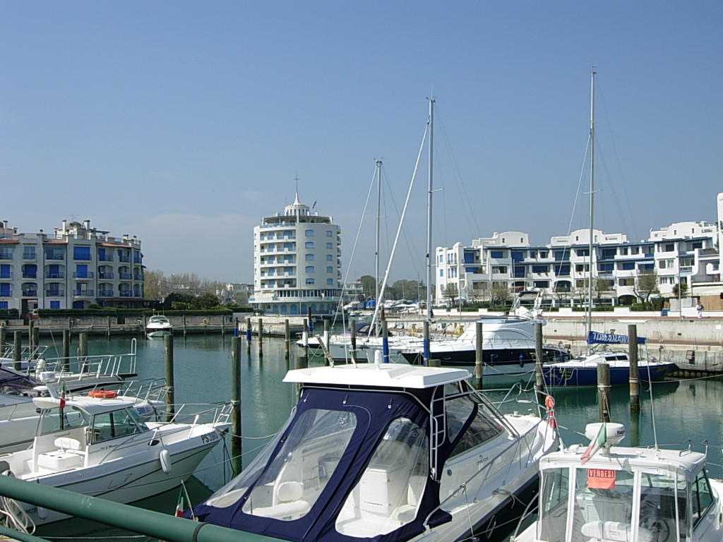 Darsena a Portoverde (Misano Adriatico)